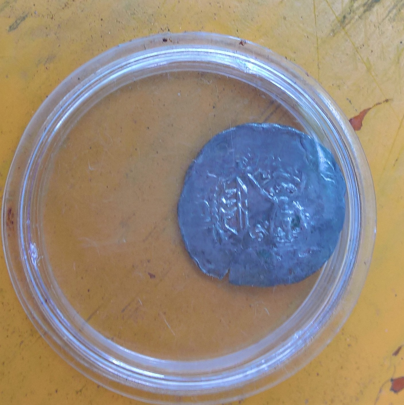 Bilder von der Ausgrabung am Burgstall Kugelburg in Goldbach, Unterfranken im August 2018. Münze des Mainzer Erzbischofs Adalbert I. von Saarbrücken, Vorderseite (Bischofsdarstellung)